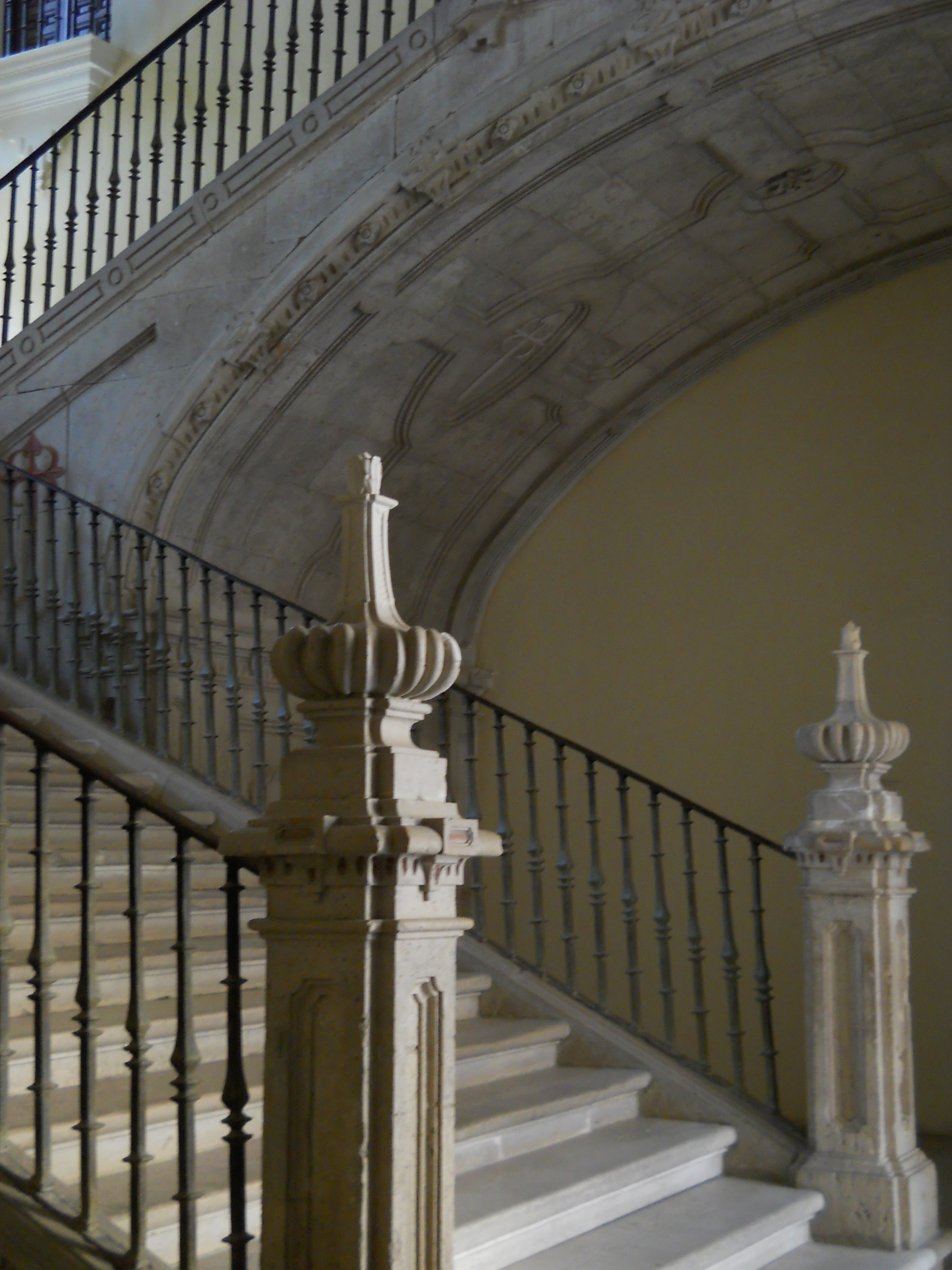 Scalone, Monastero di Uclés, Cuenca, Spagna